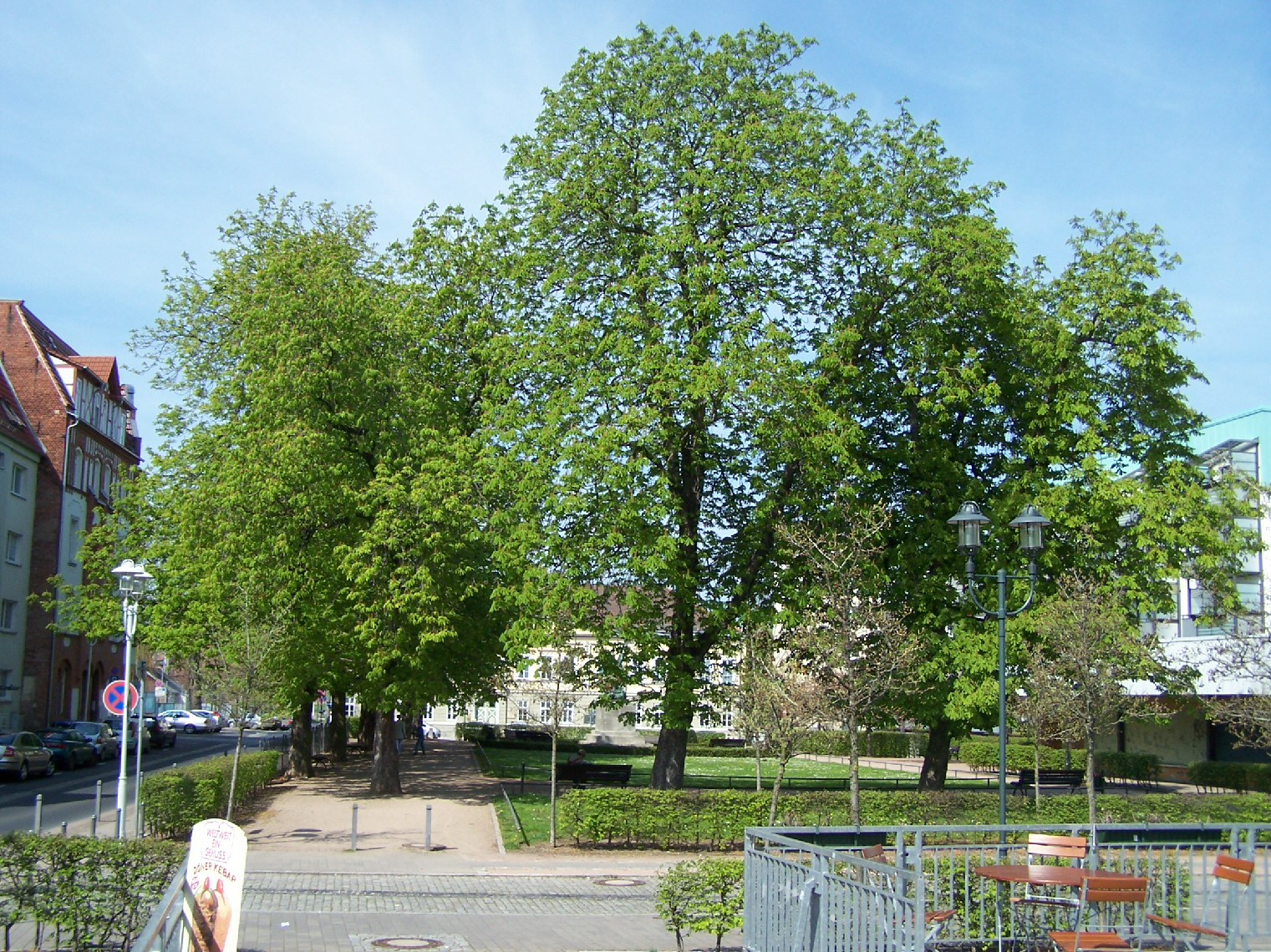 Jakobsplan